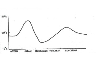 У креди на простору Европе